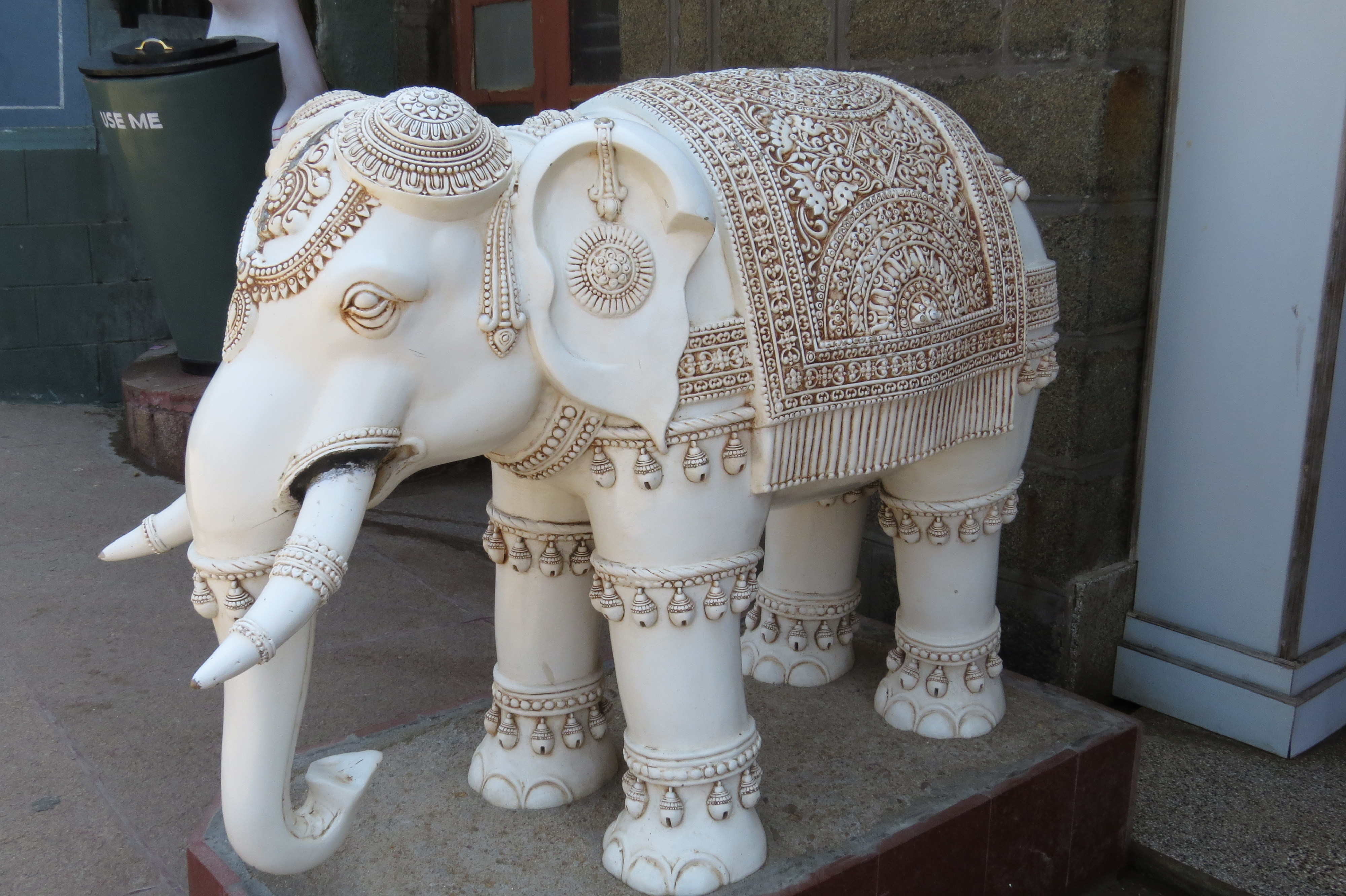 விற்பனைக்கு உள்ள பளிங்கு யானை